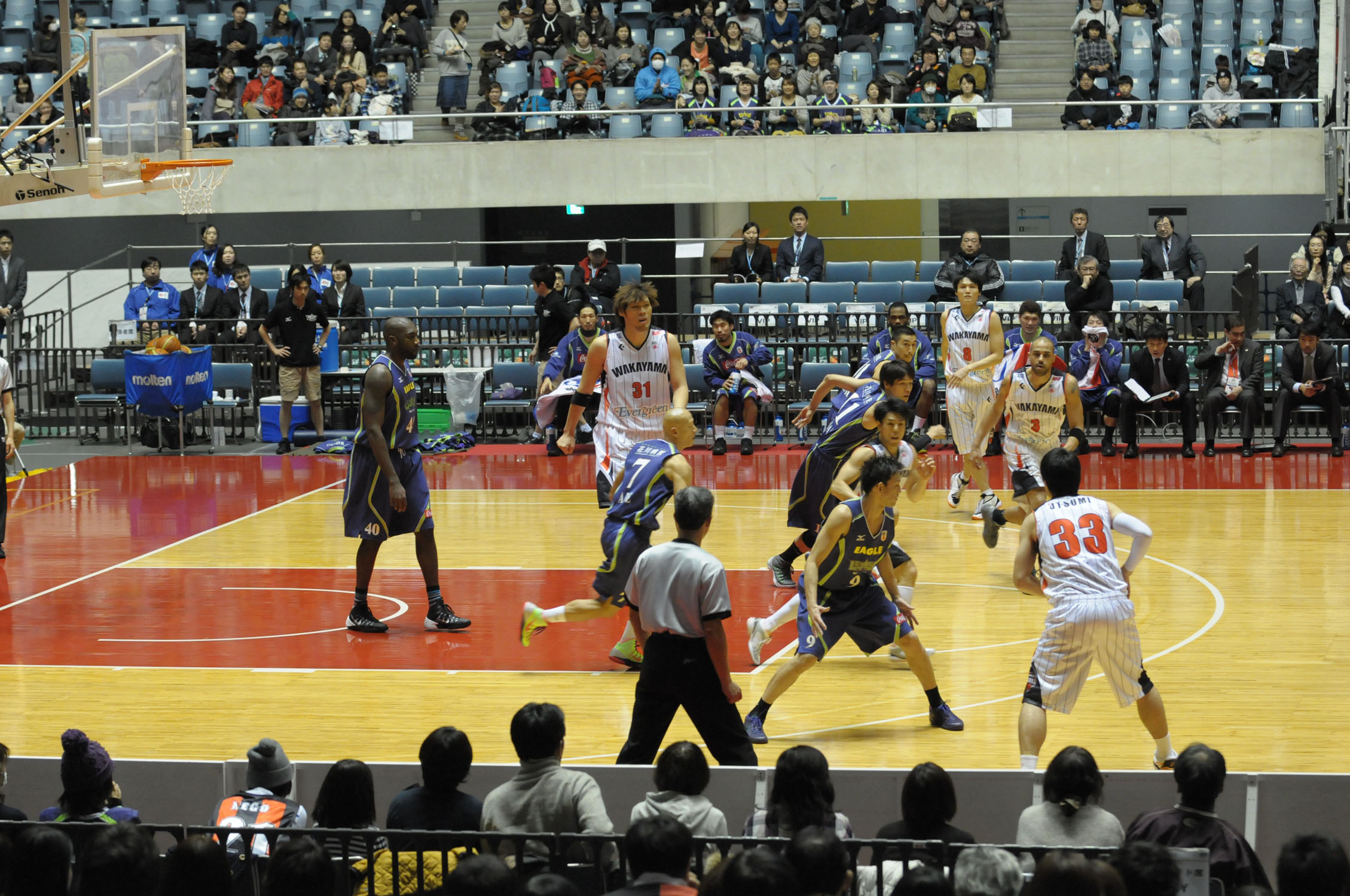 2014年全日本総合バスケットボール選手権大会準々決勝、和歌山トライアンズ対レバンガ北海道。代々木第一体育館で。